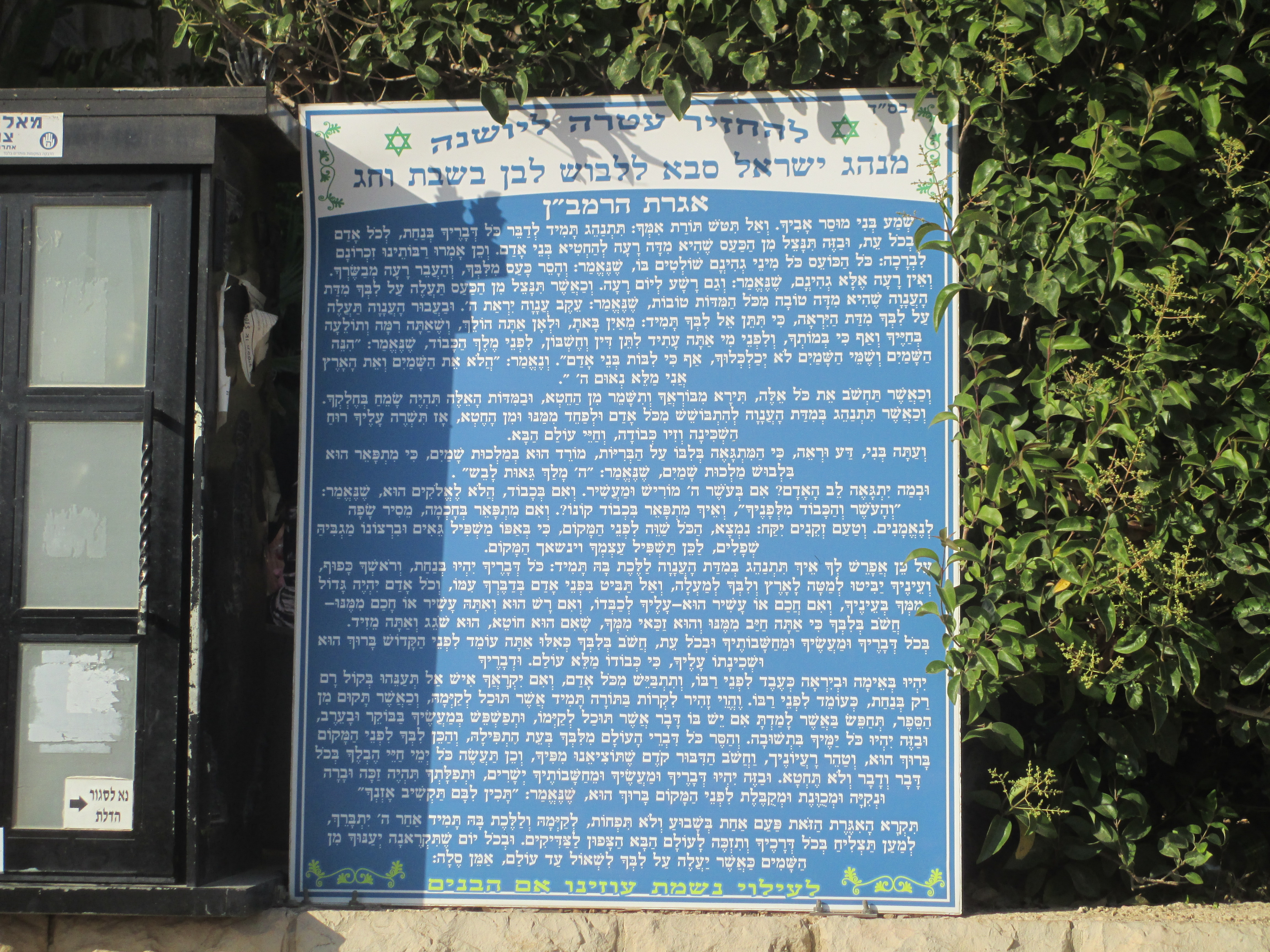 איגרת הרמב"ן בחברון